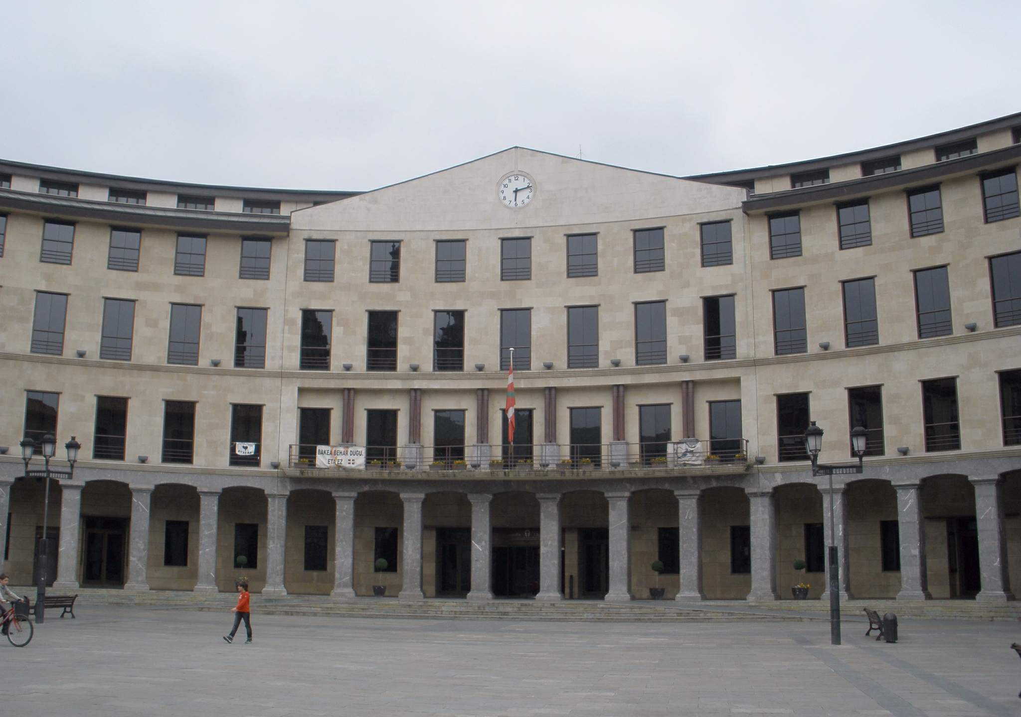 Herrizo Plaza y Ayuntamiento de Llodio (Álava)